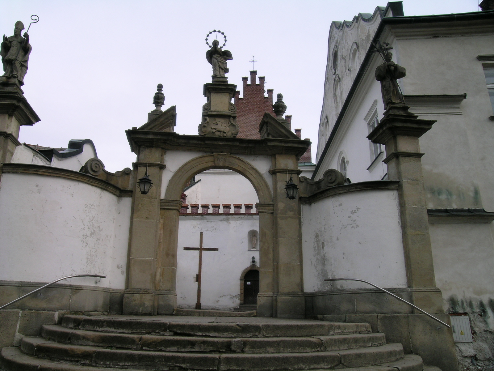 Brama wejściowa do kościoła przy opactwie cystersów w Szczyrzycu. Nad wejściem herb Gryf wojewody krakowskiego, fundatora kościoła. Autor: mkedzie, 11.11.2006